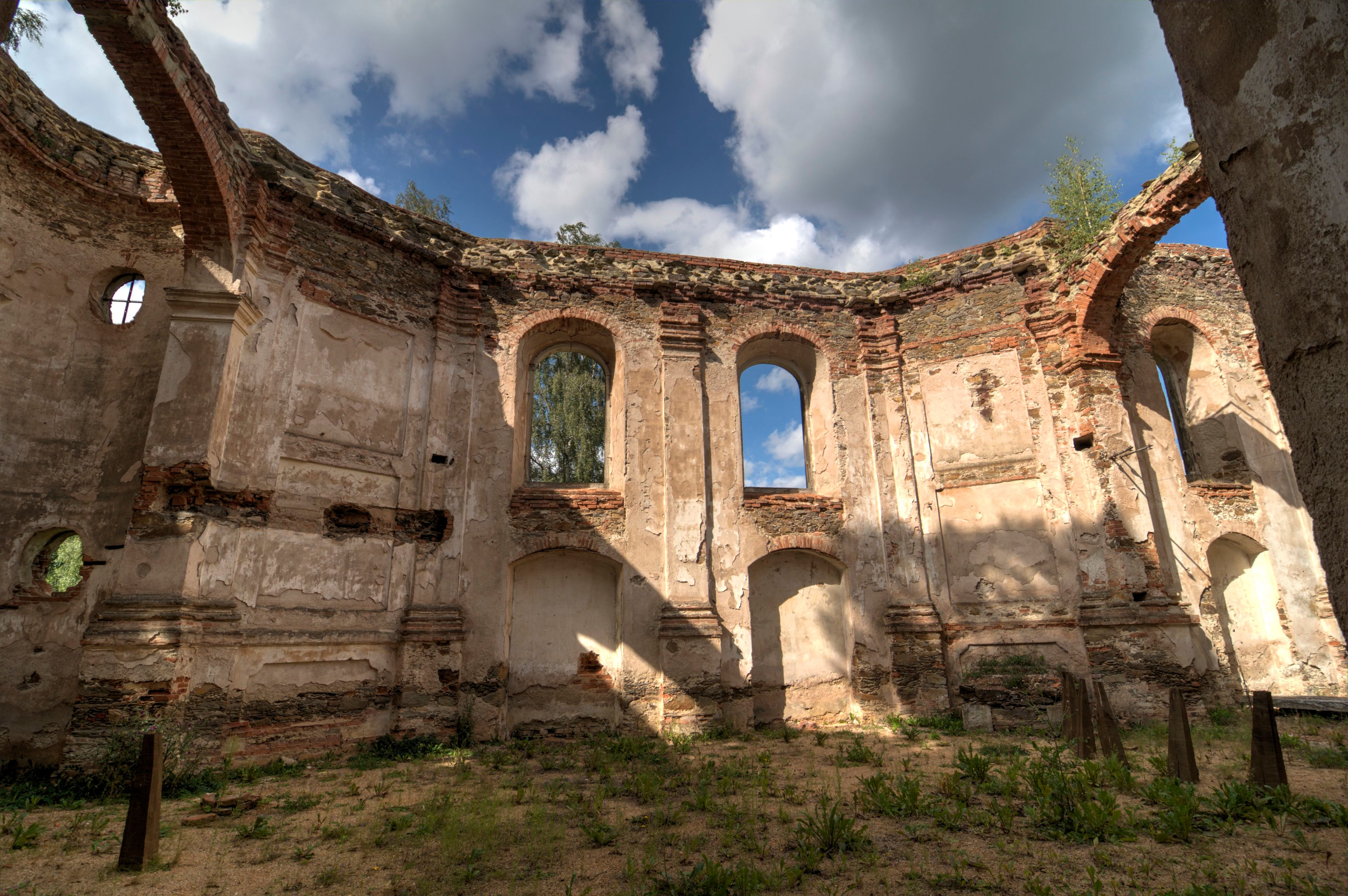 Interiér kostela sv. Blažeje při pohledu od jihu